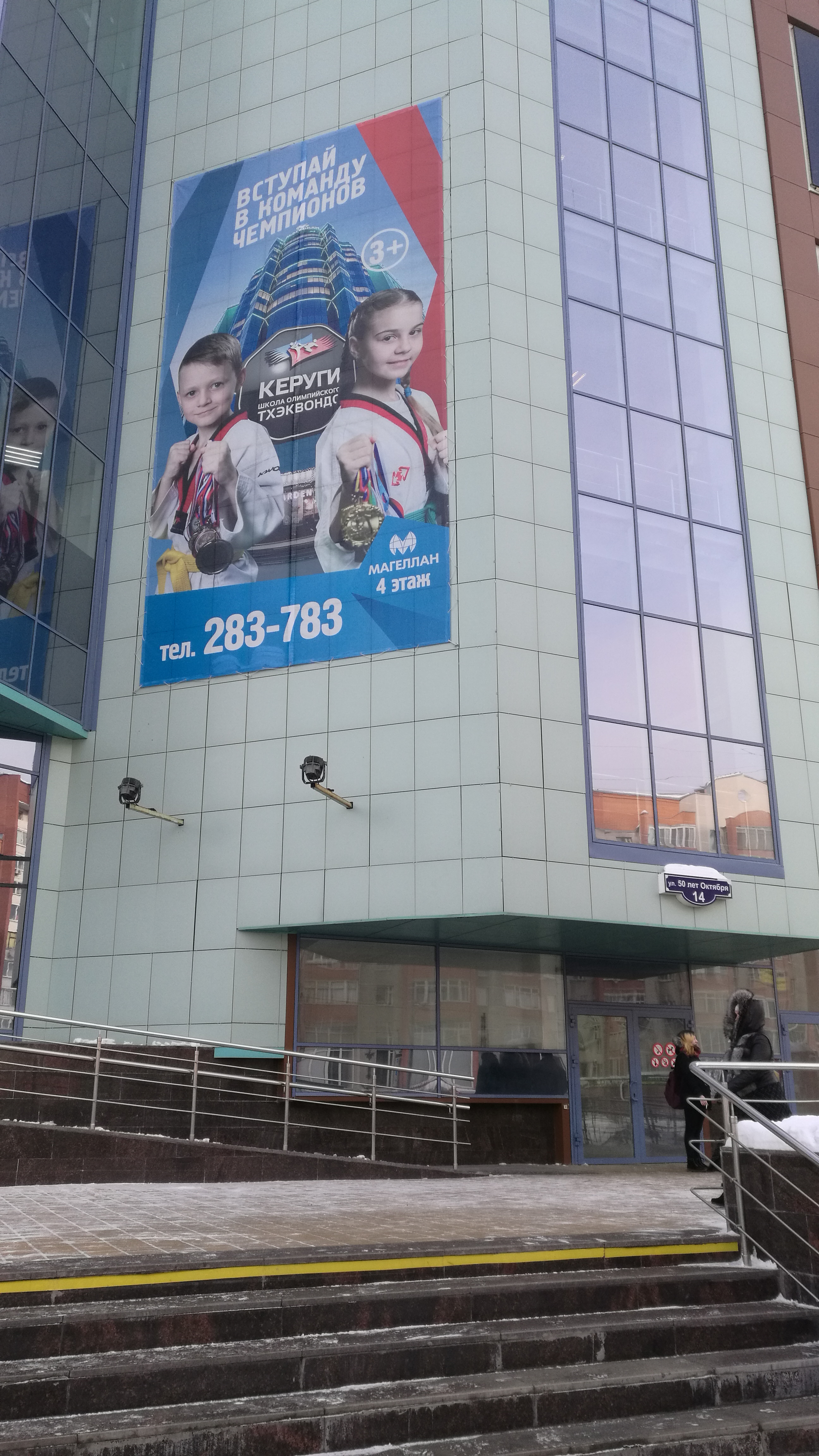 La aĉetcentro Magellan. Tjumeno, Rusio.